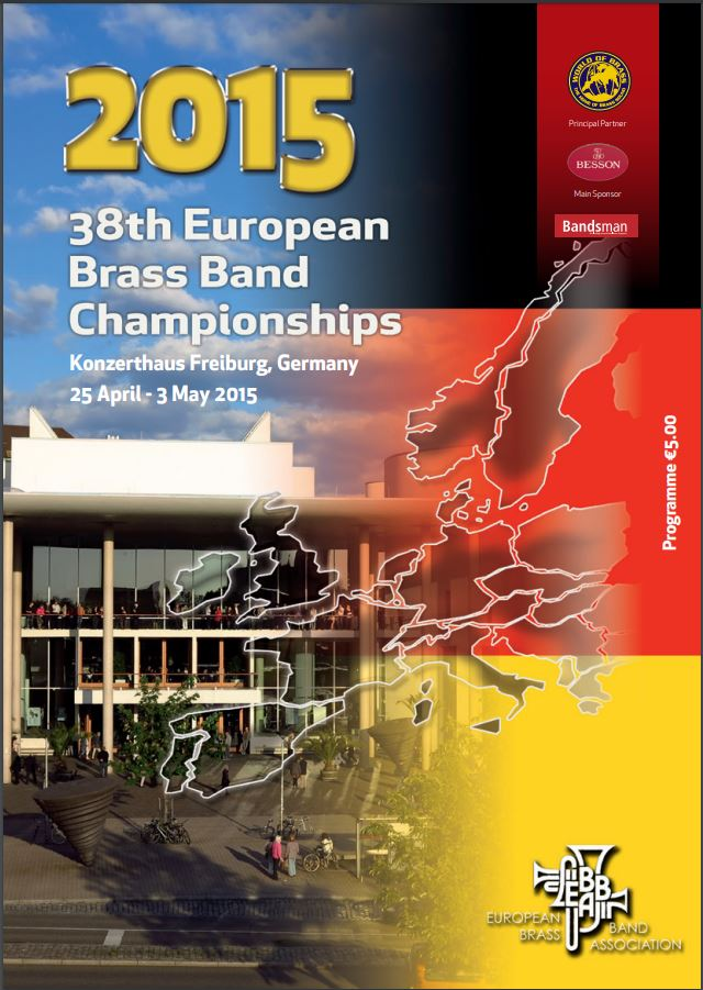 Programforside - EM brassband 2015